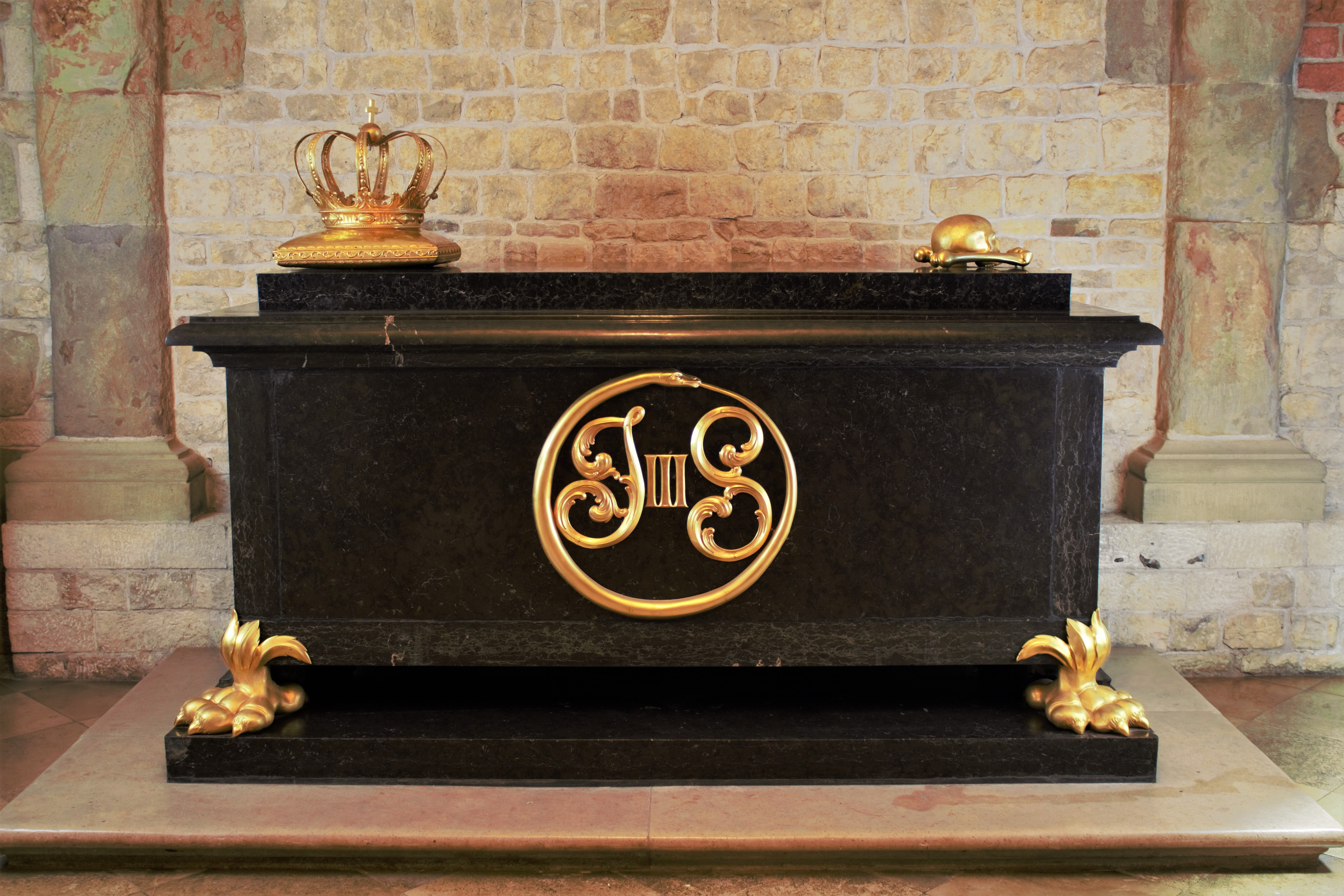 Sarkofag Jana III Sobieskiego w katedrze wawelskiej